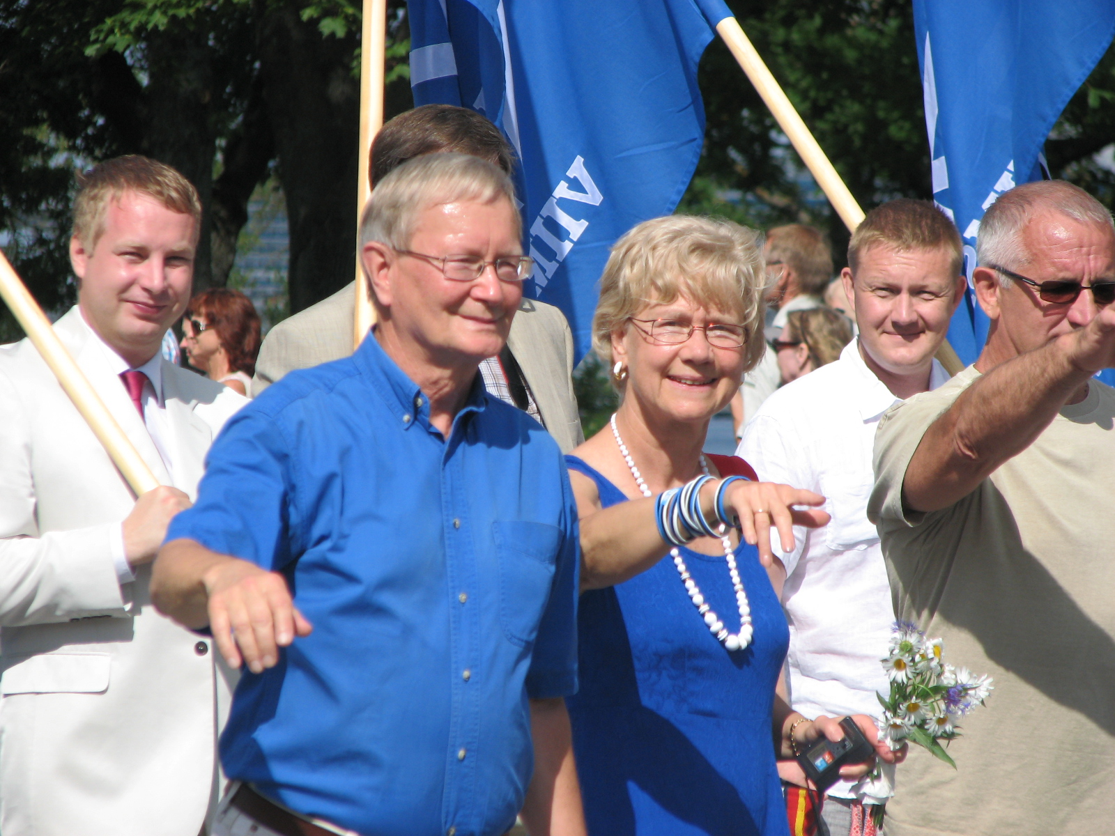 Viimsi valla esindus XI noorte laulu- ja tantsupeo rongkäigus, vasakult Jan Trei, Tunne Kelam, Mari-Ann Kelam